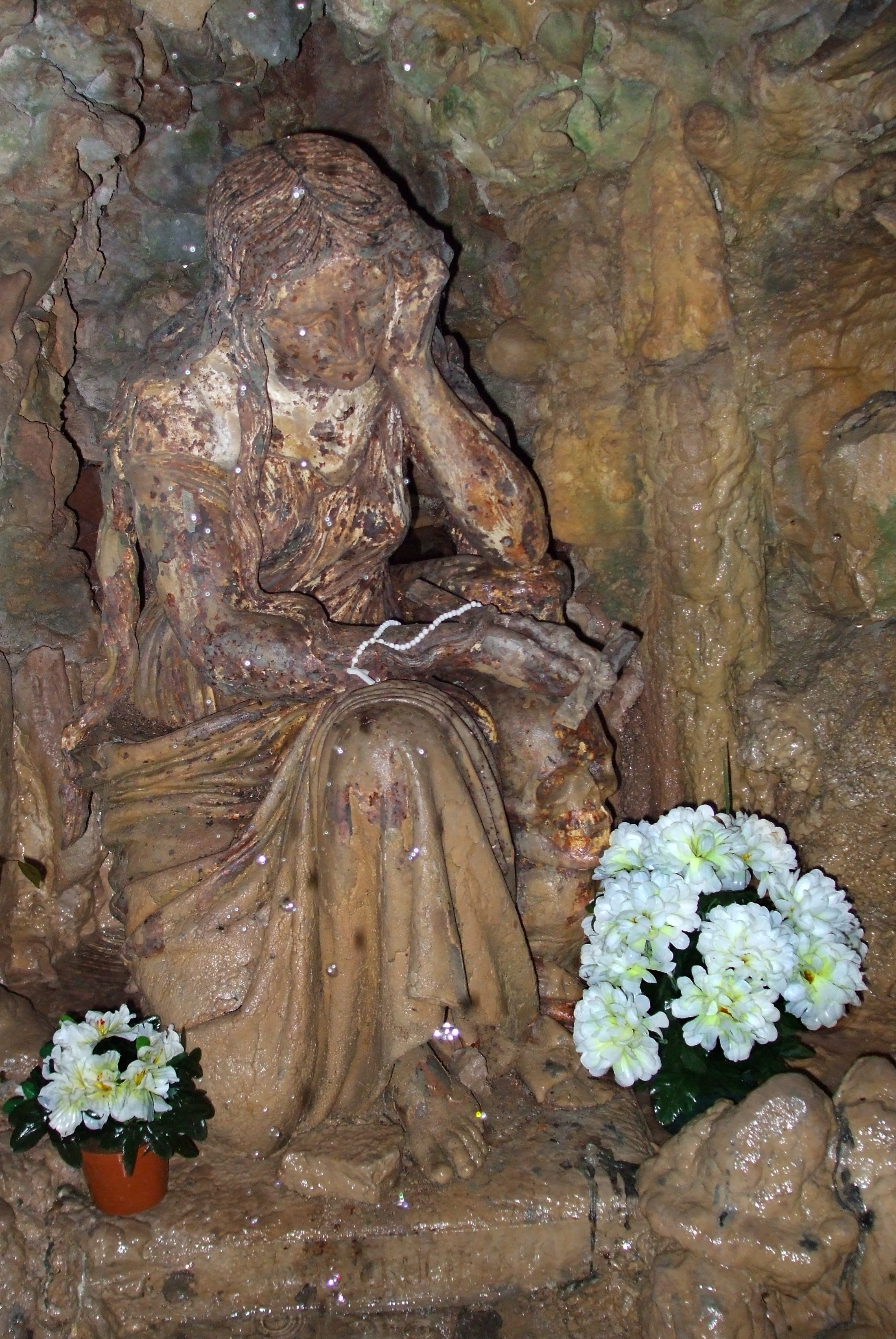 Statue de la Madeleine, à Baulou, Ariège, France.